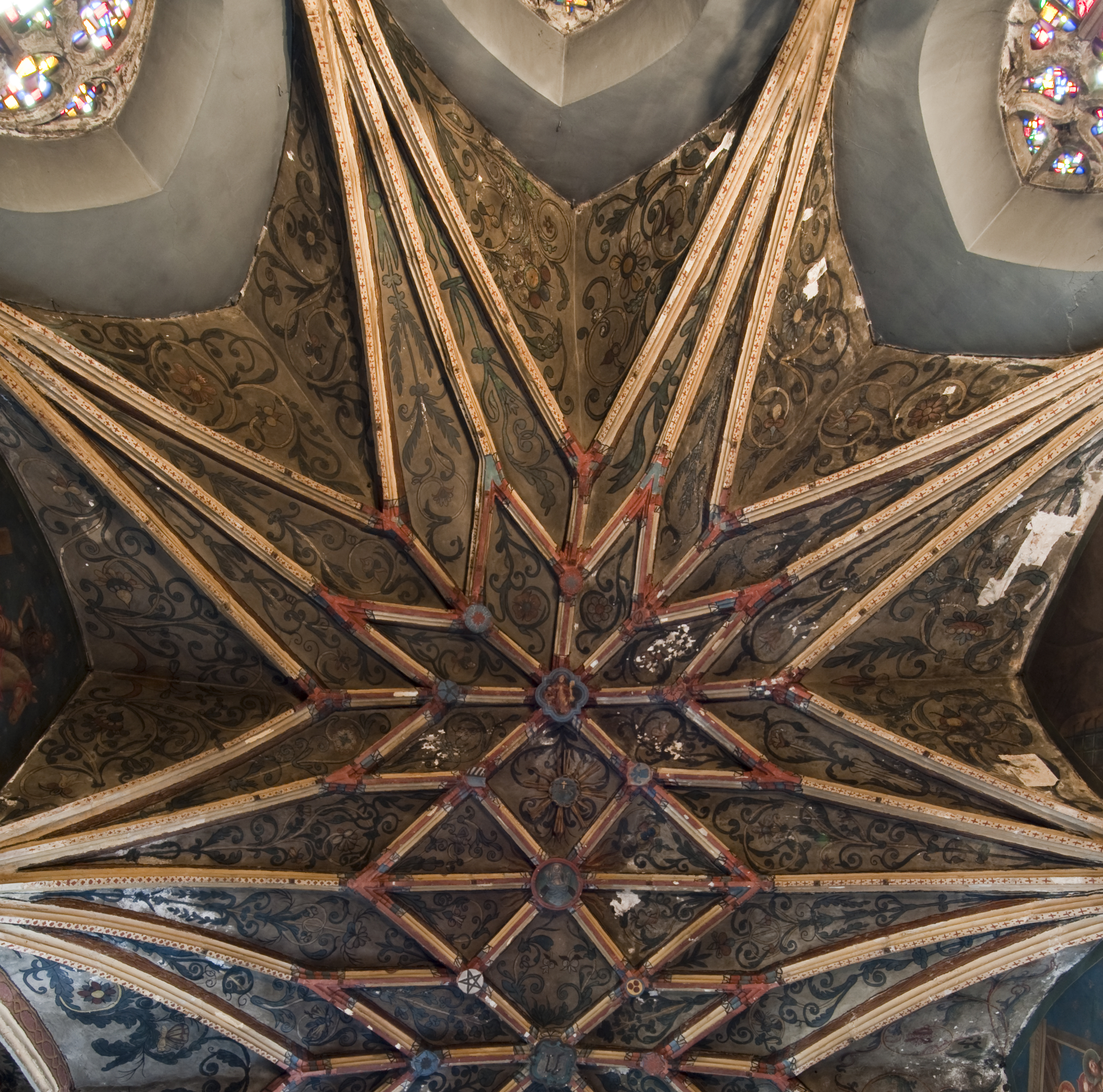 Baaschtnech St Pierre Plafong vum Chouer. Saint Pierre Baaschtnech